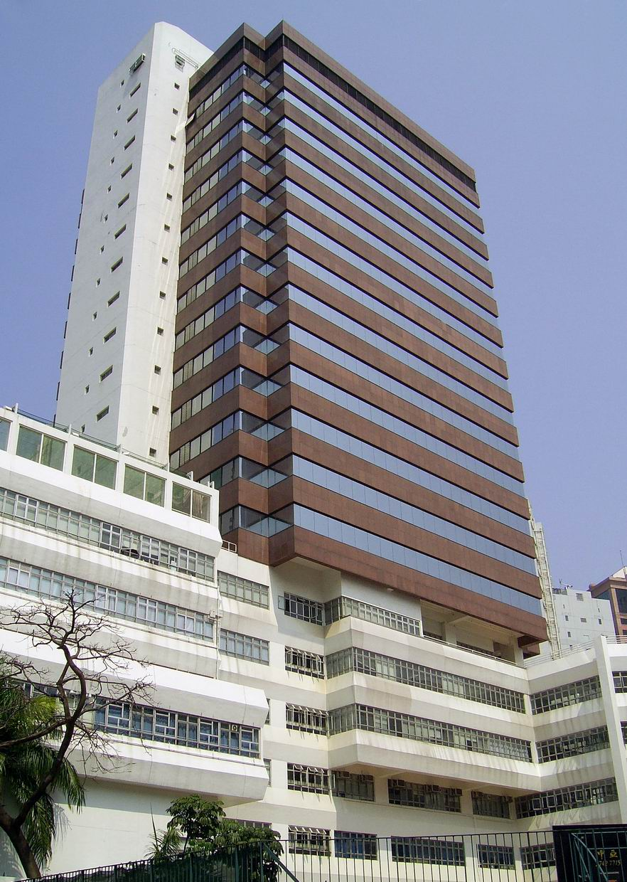 灣仔活道職業訓練局大樓